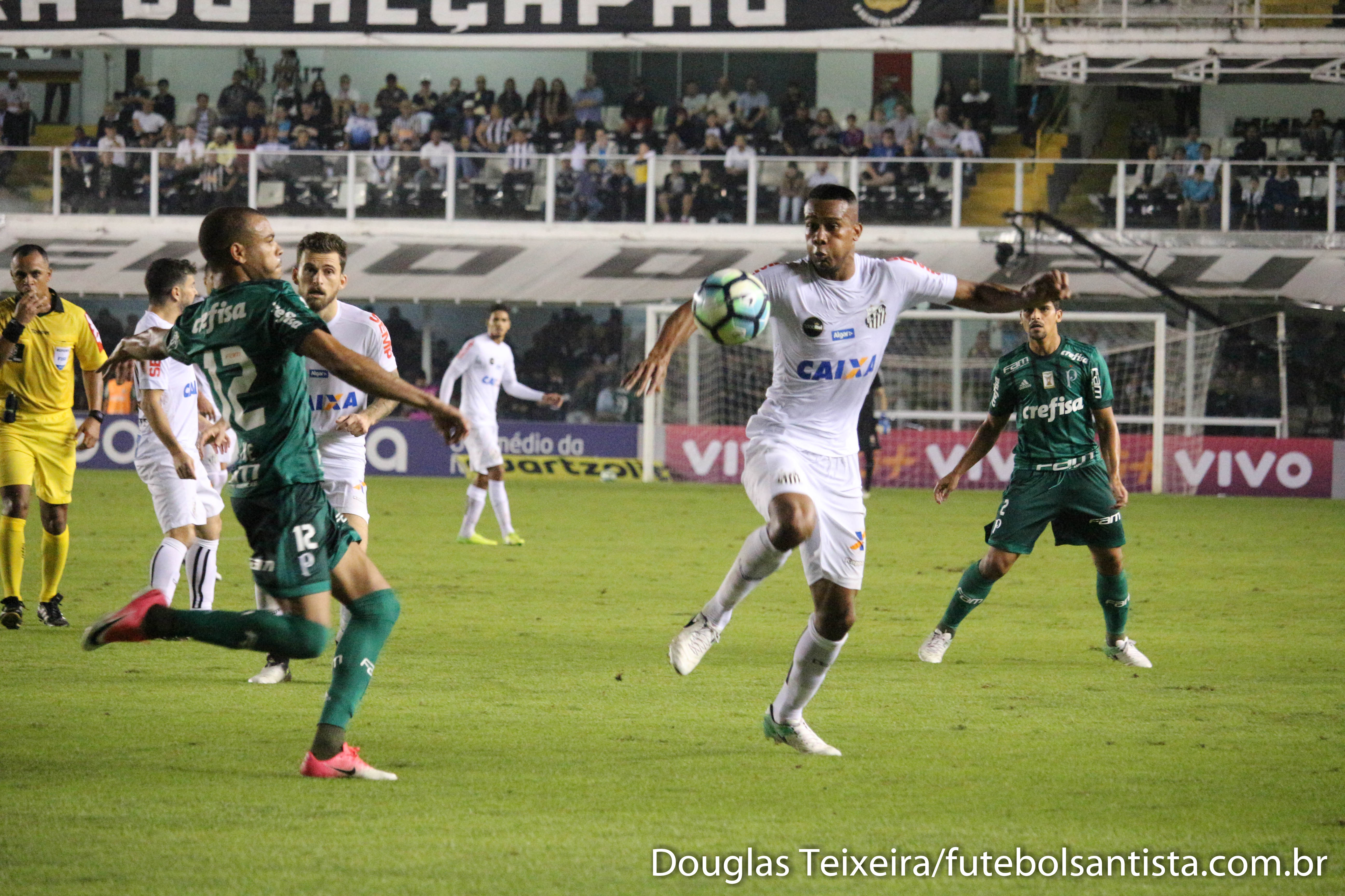 Foto: Douglas Teixeira/Futebol Santista